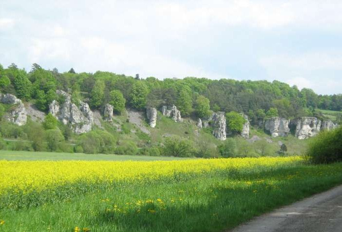 Felsformation Zwölf Apostel im Altmühltal bei Solnhofen